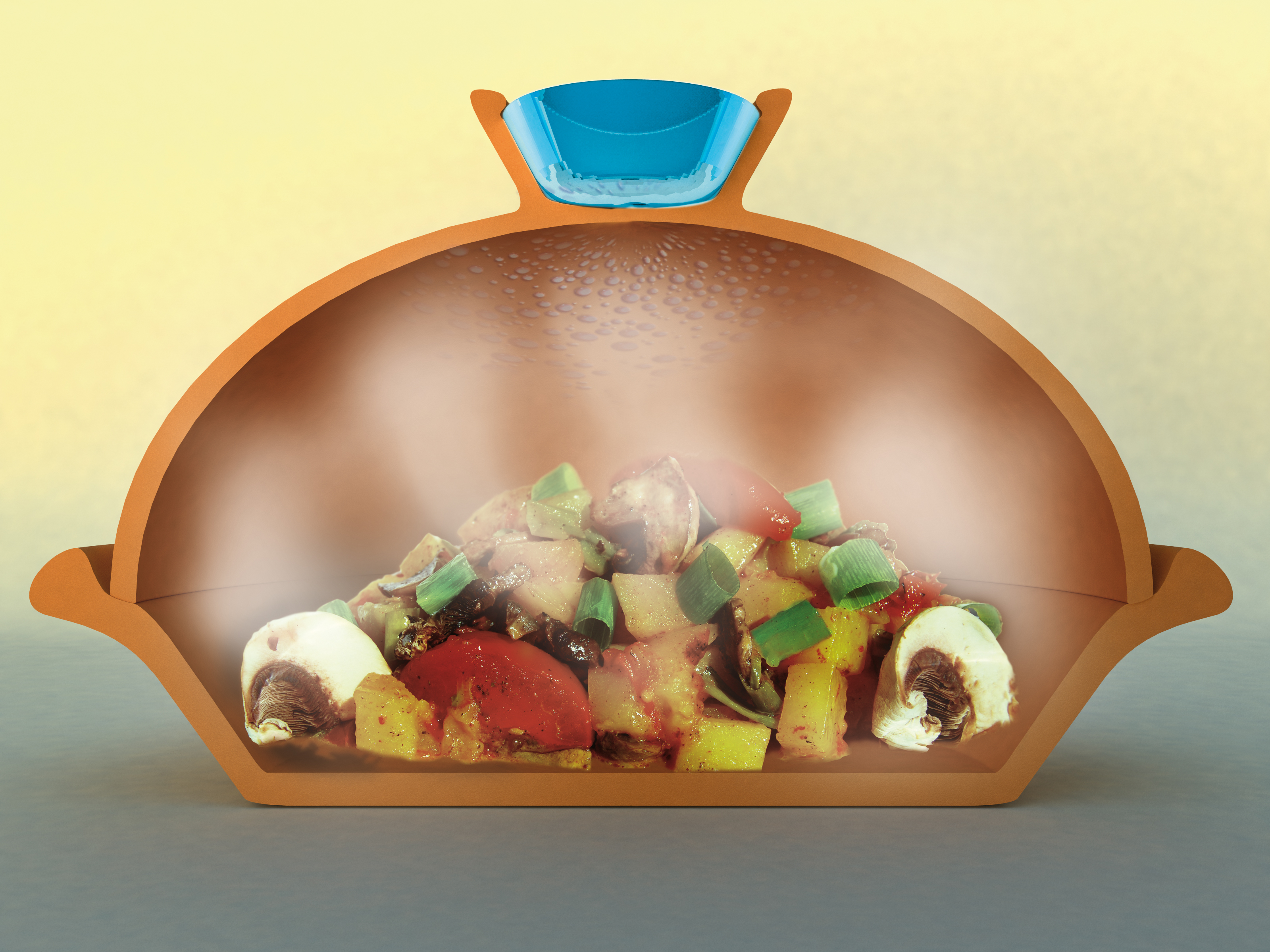 Der Dampfkreislauf in einer Tajine während des Garvorgangs